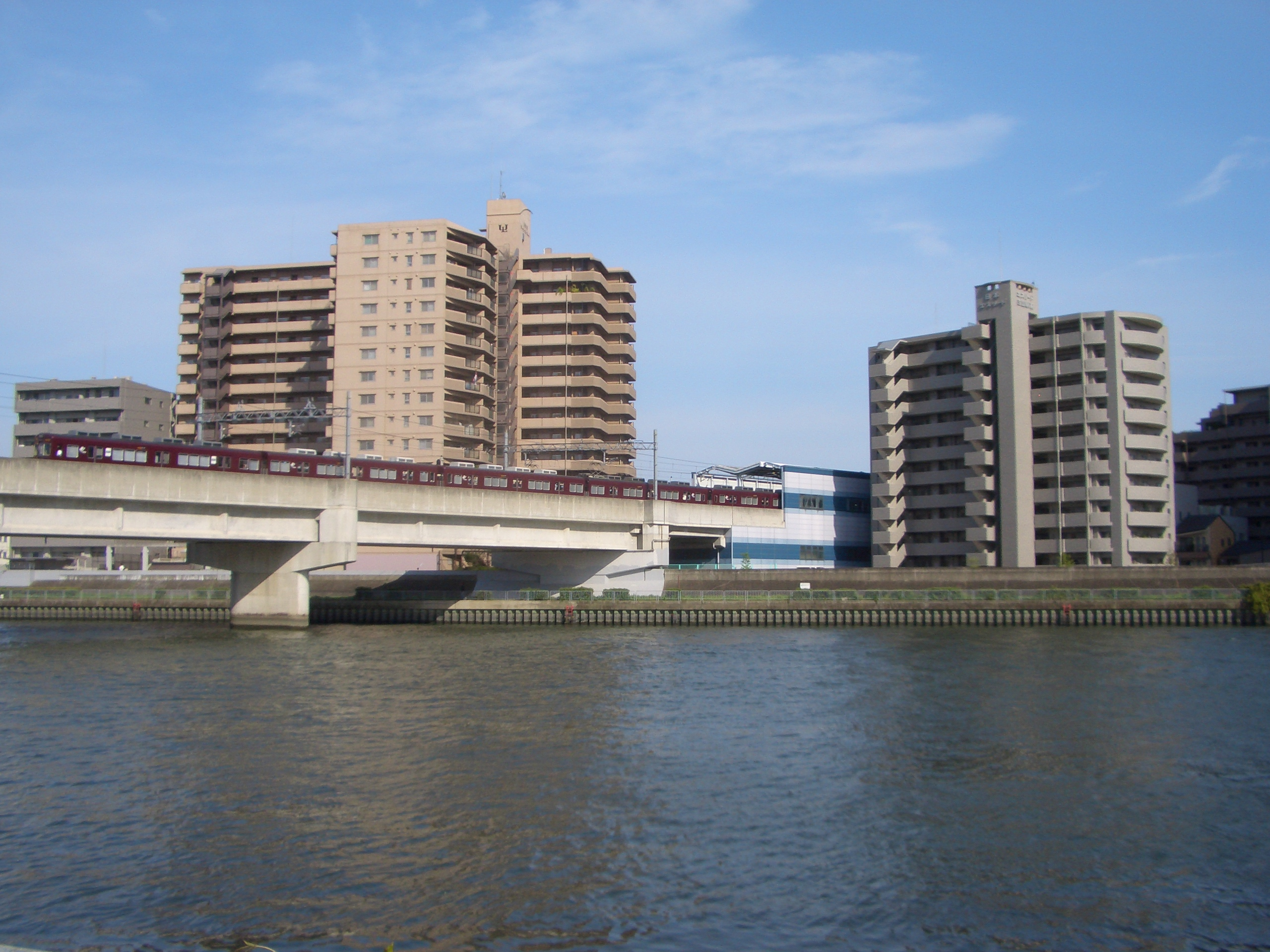 三国駅。 Mikuni Station （Hankyu Kobe Line）。